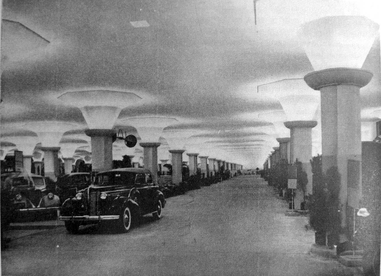 Estacionamientos subterráneos públicos en el subsuelo de la Avenida 9 de Julio, los primeros de este tipo construidos por la Municipalidad de Buenos Aires en su ciudad.